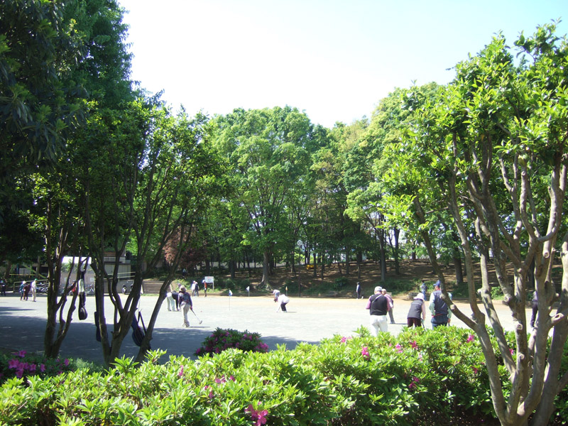 中央公園